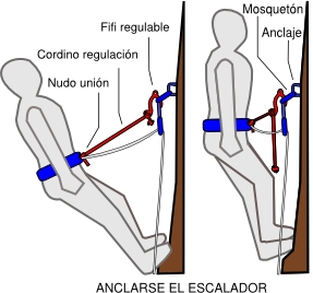 Dibujo sobre el uso de la fifi en escalada